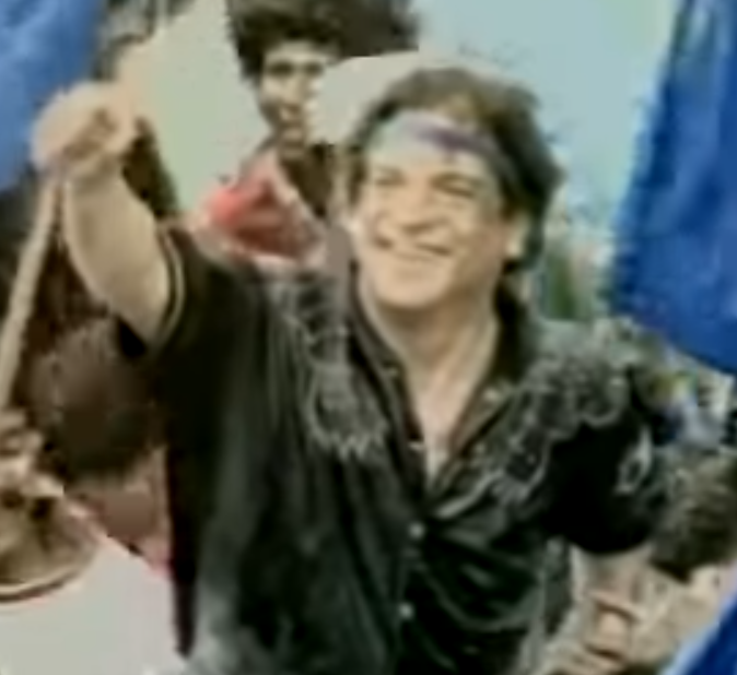 Gaëtan Duval lors d'un meeting à Curepipe dans les années 80.